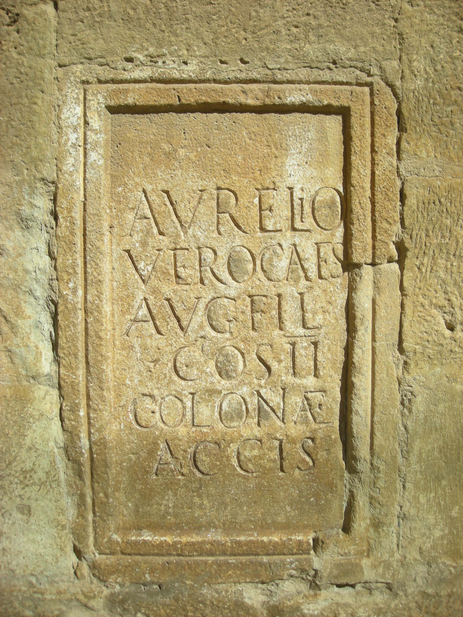 Inscripción en la catedral de Guadix: CIL II 3392 = ILPGranada 69 = CILA 04, 124 "AVRELIO // VERO CAES(ari) // AVG(usti) FIL(io) // CO(n)S(uli) II // COLONIA{E} // ACCIS"